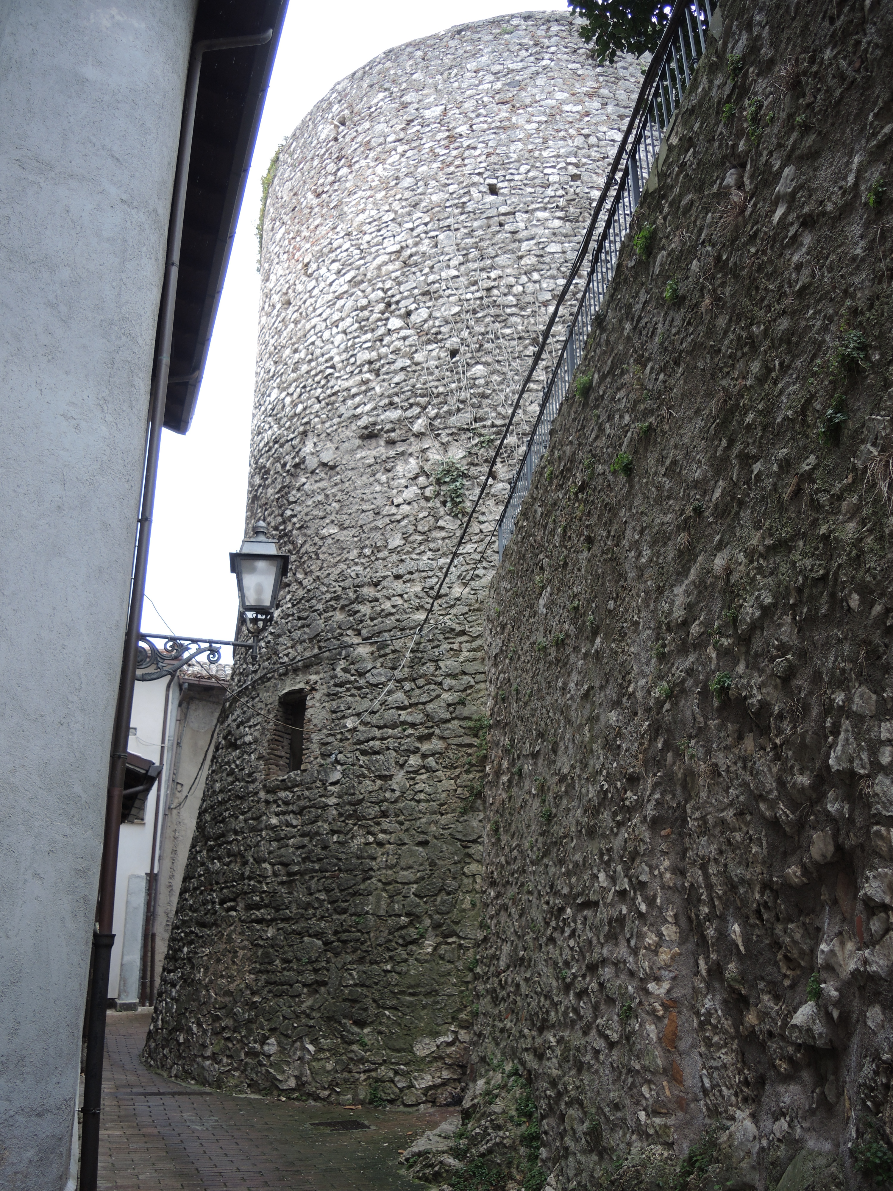 Oricola